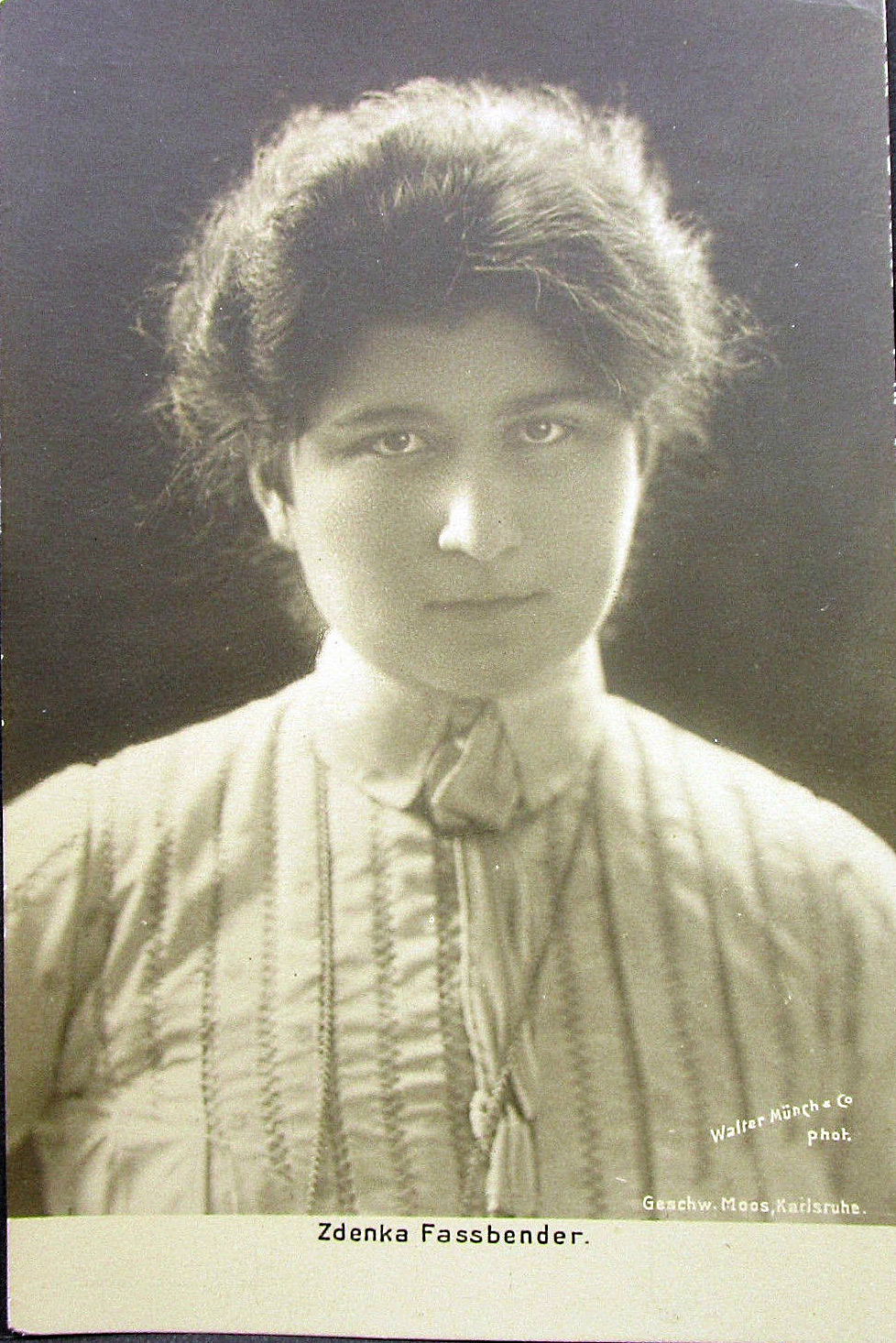 Photokarte - Die Sopranistin Zdenka Faßbender